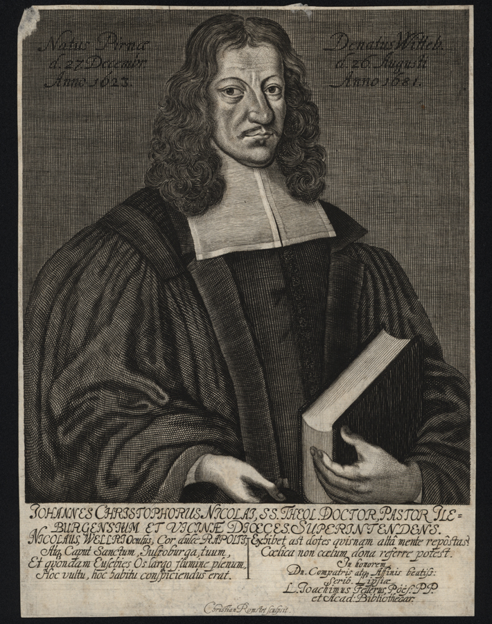 Porträt des Superintendenten Johann Christoph Nicolai (1623-1681)